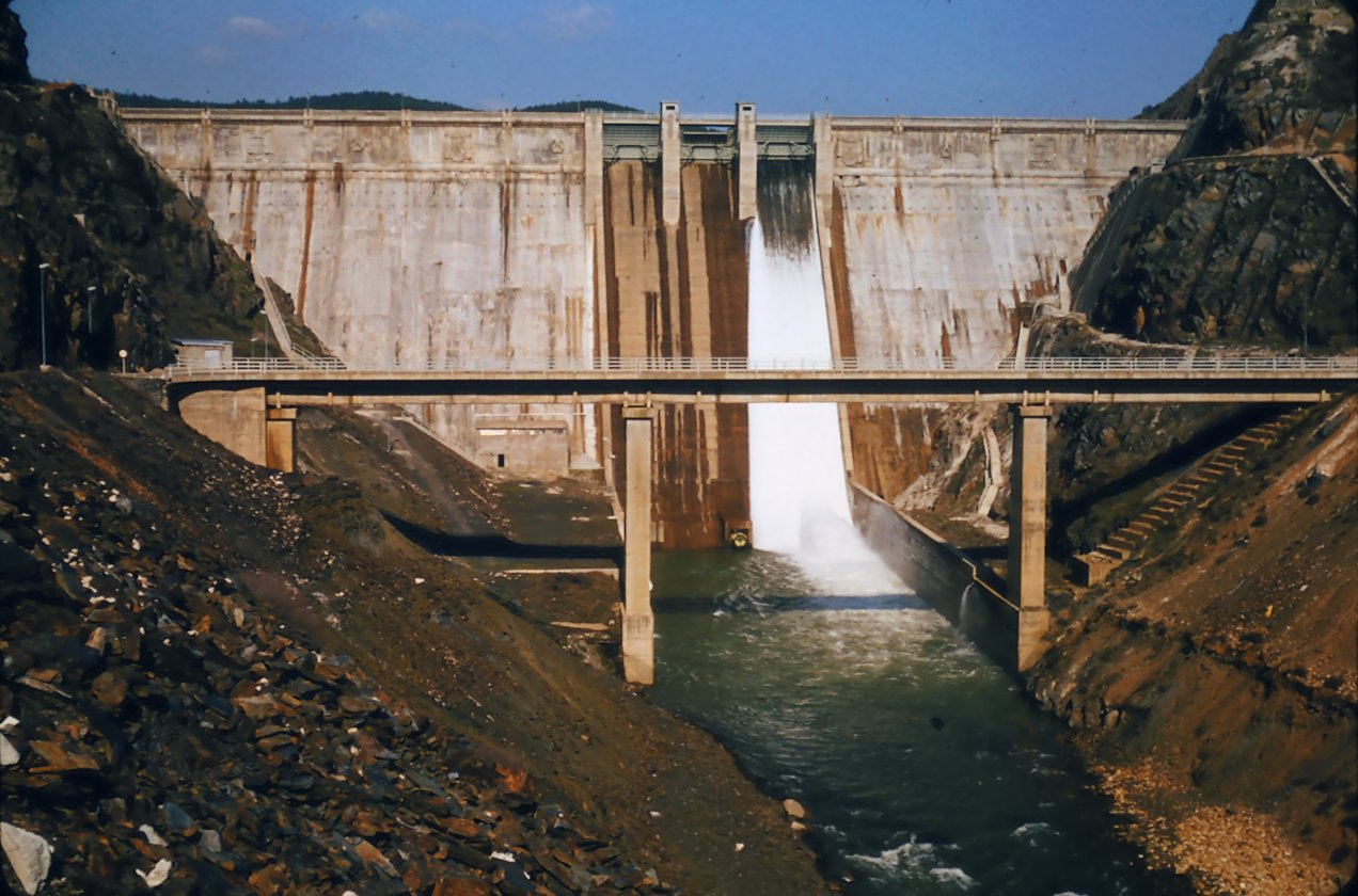 Tramo final en acueducto del canal del Sorbe junto a la presa de El Vado.